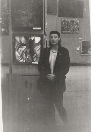 Юлия Долгорукова на Всесоюзной выставке в Манеже